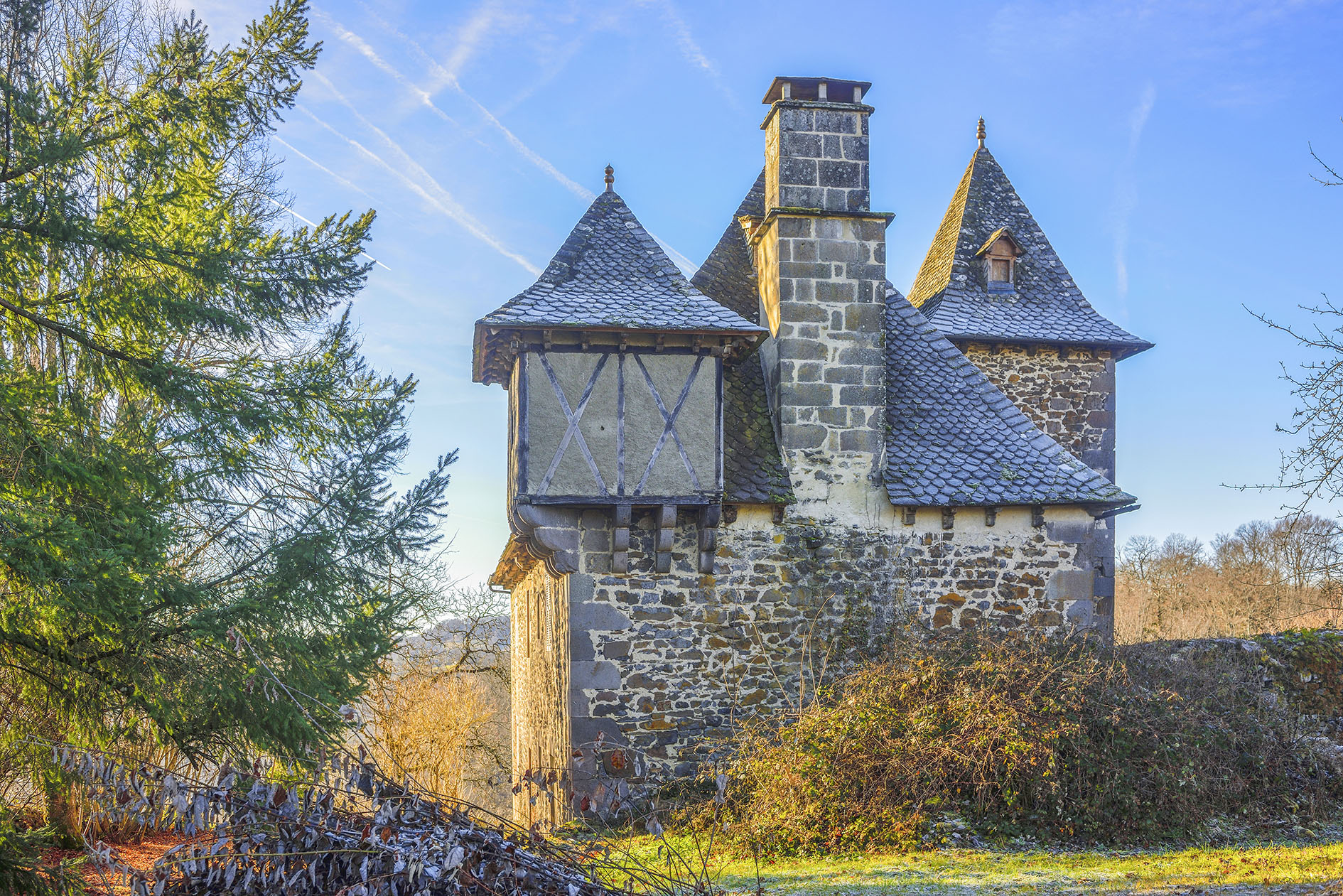 Le manoir de Courbesserre en Carladez cantalien, vue d’ensemble N.E. a contre-jour en hiver, commune de Carlat, Cantal, France, Europe.